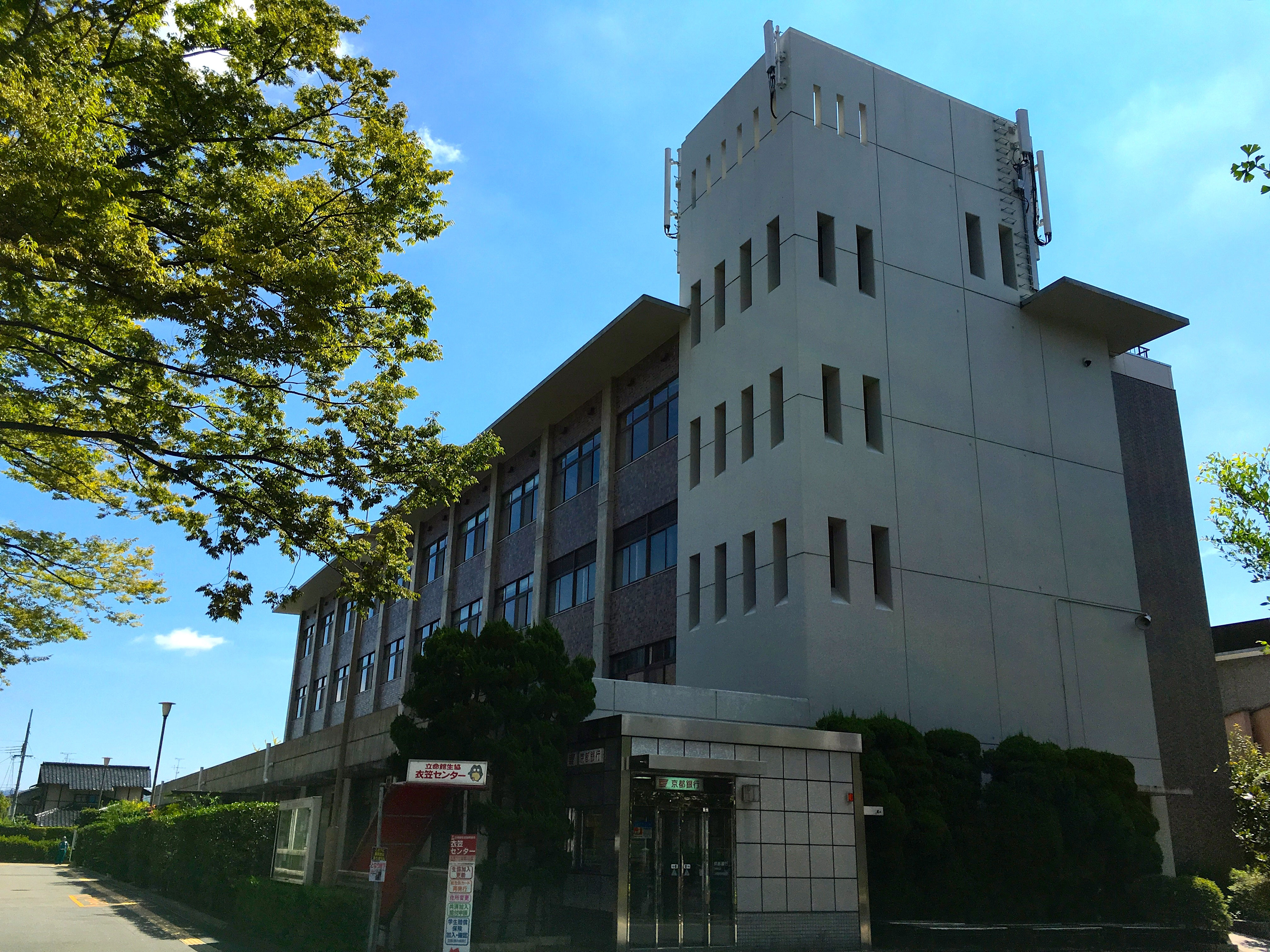 Shigakukan Hall at Ritsumeikan